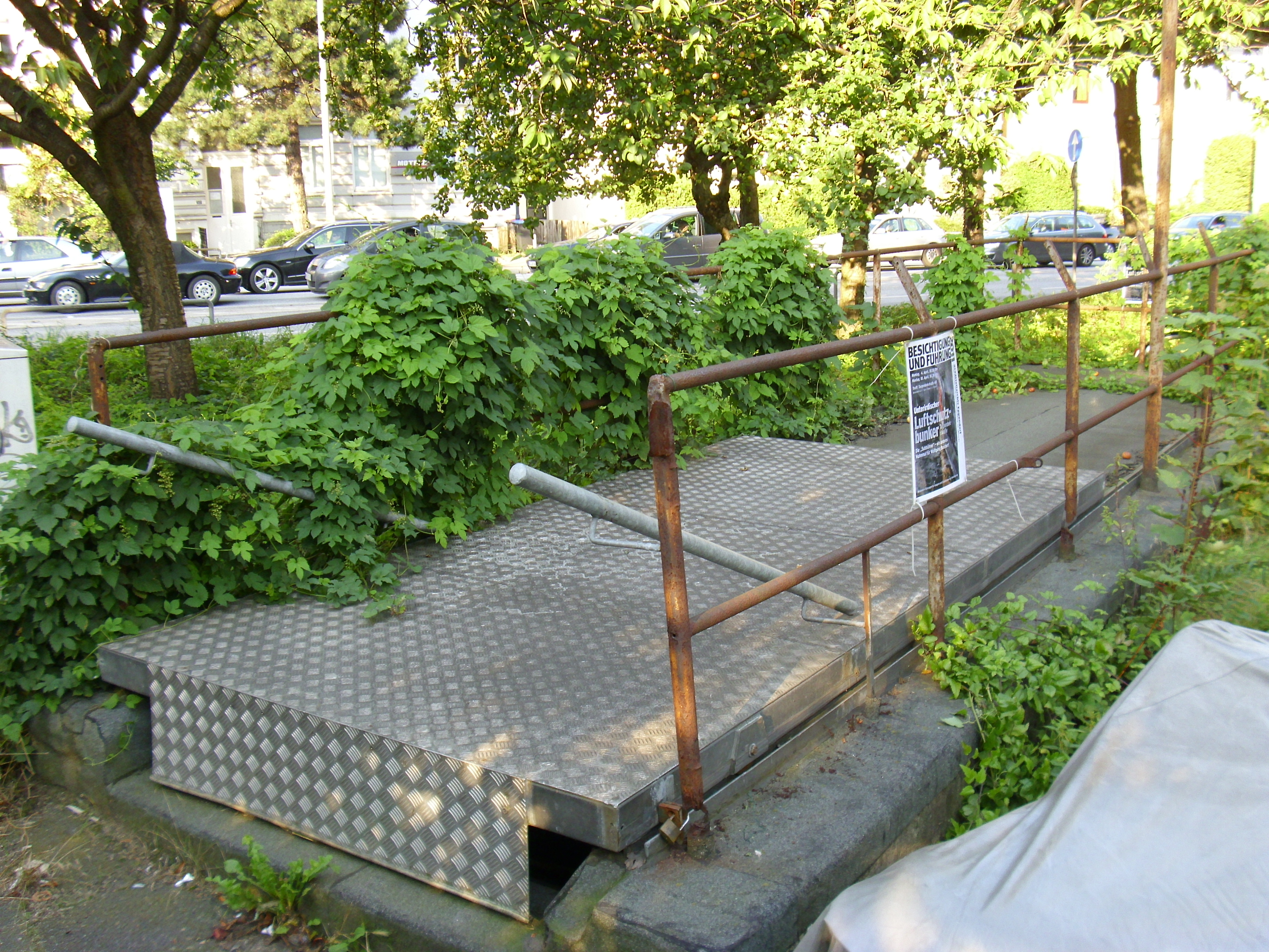 Eingang zum Röhrenbunker am Ernst-Thälmann-PlatzThis is a photograph of an architectural monument.